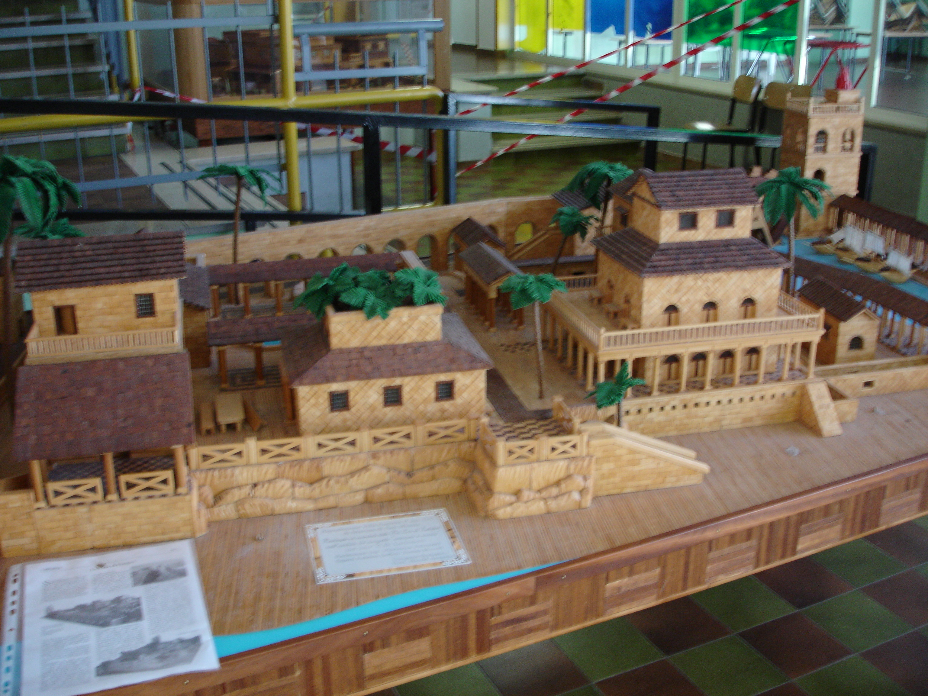 Modellino della Villa di Pompeo nella scuola di castellamare di Ladispoli